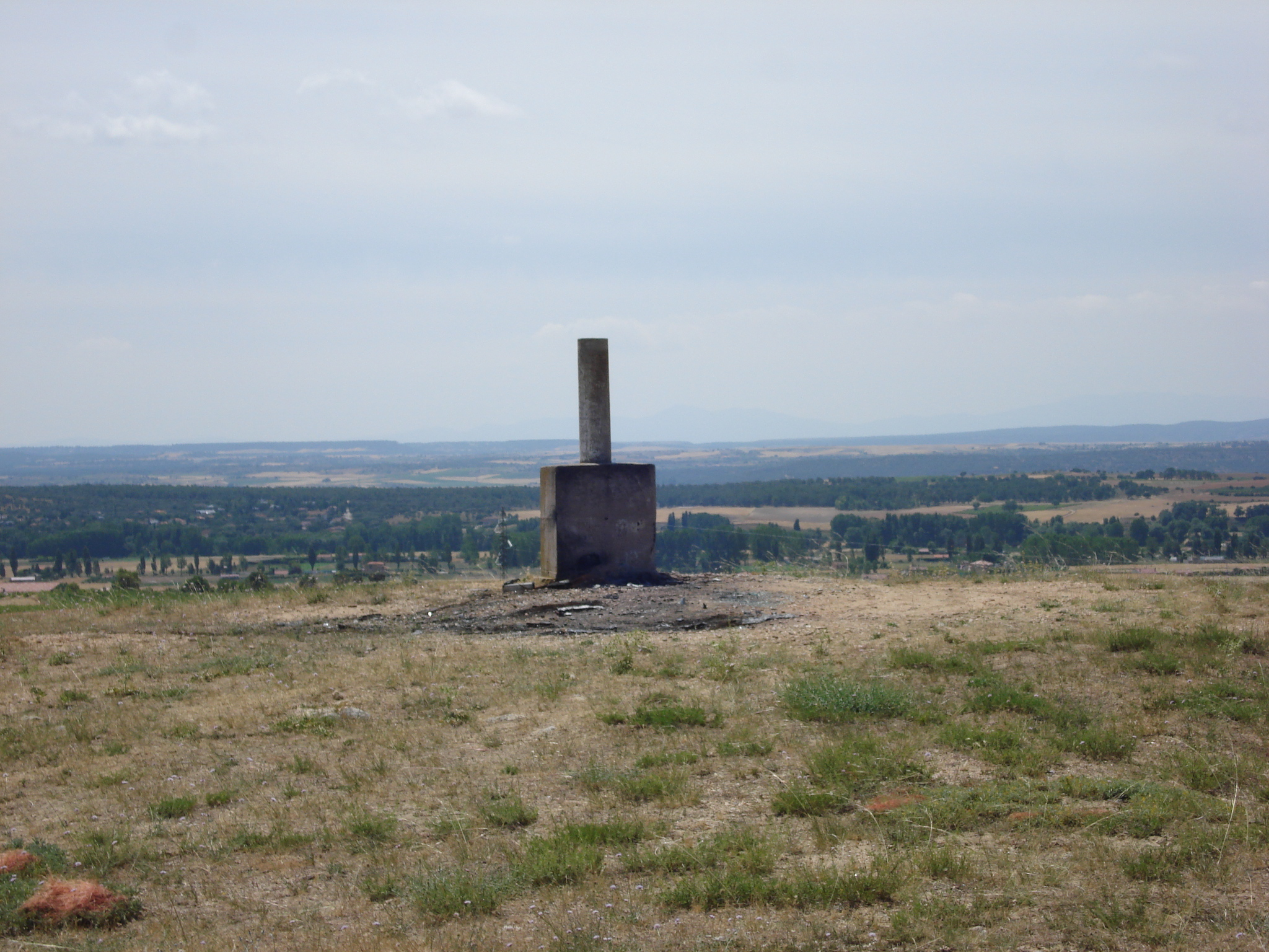 Señal que identifica el vértice de San Bartolomé.